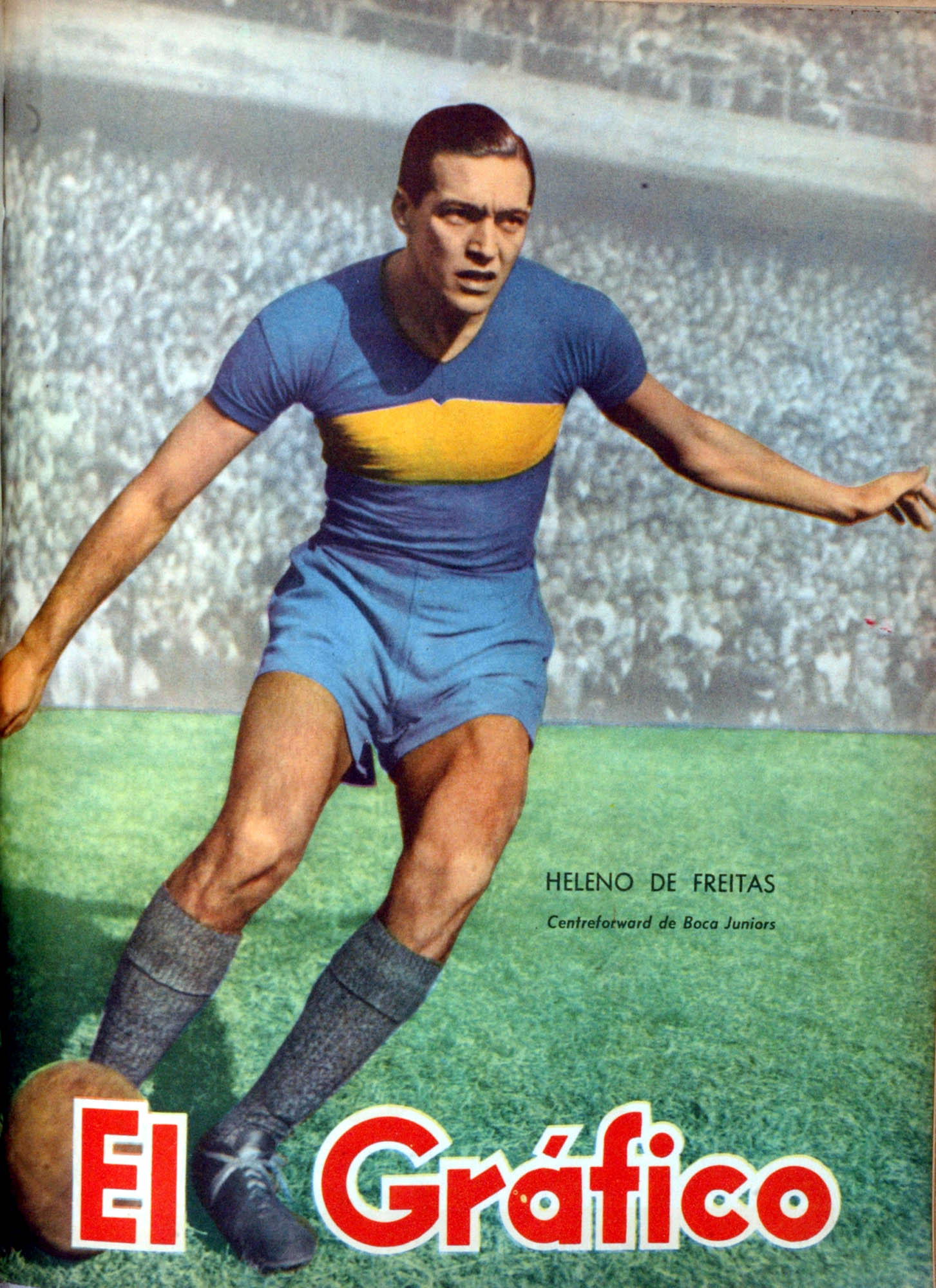 El Grafico del 01 de Octubre de 1948. Edicion 1525